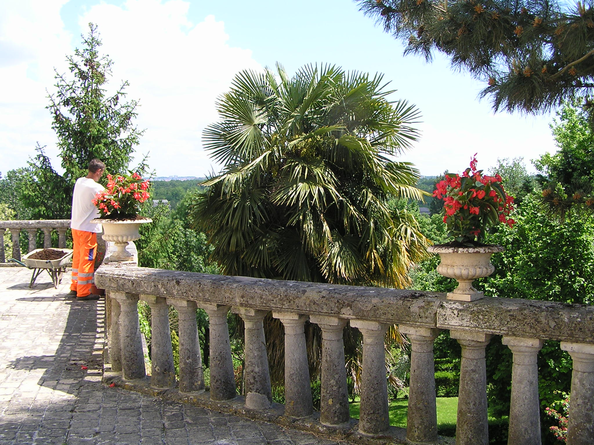 Vue des jardins depuis la mairie de Fléac